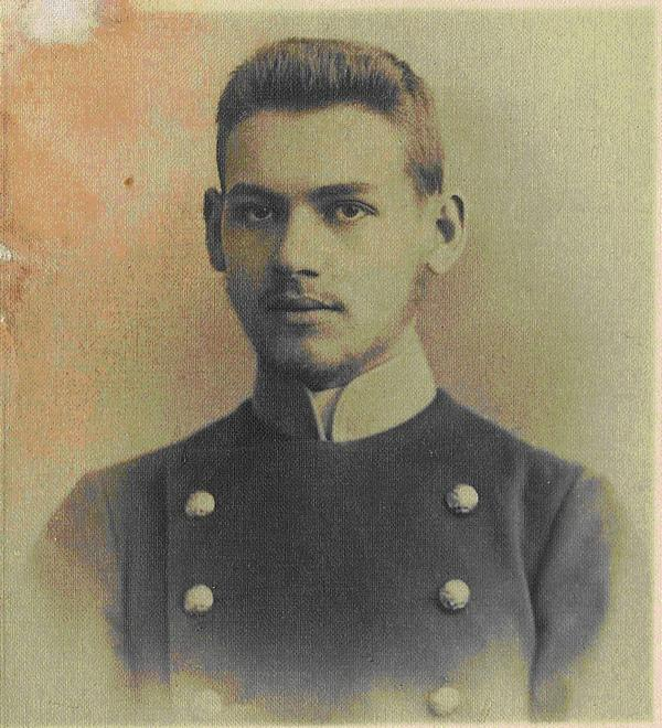 Лев Семенович Берг - 1898 год.